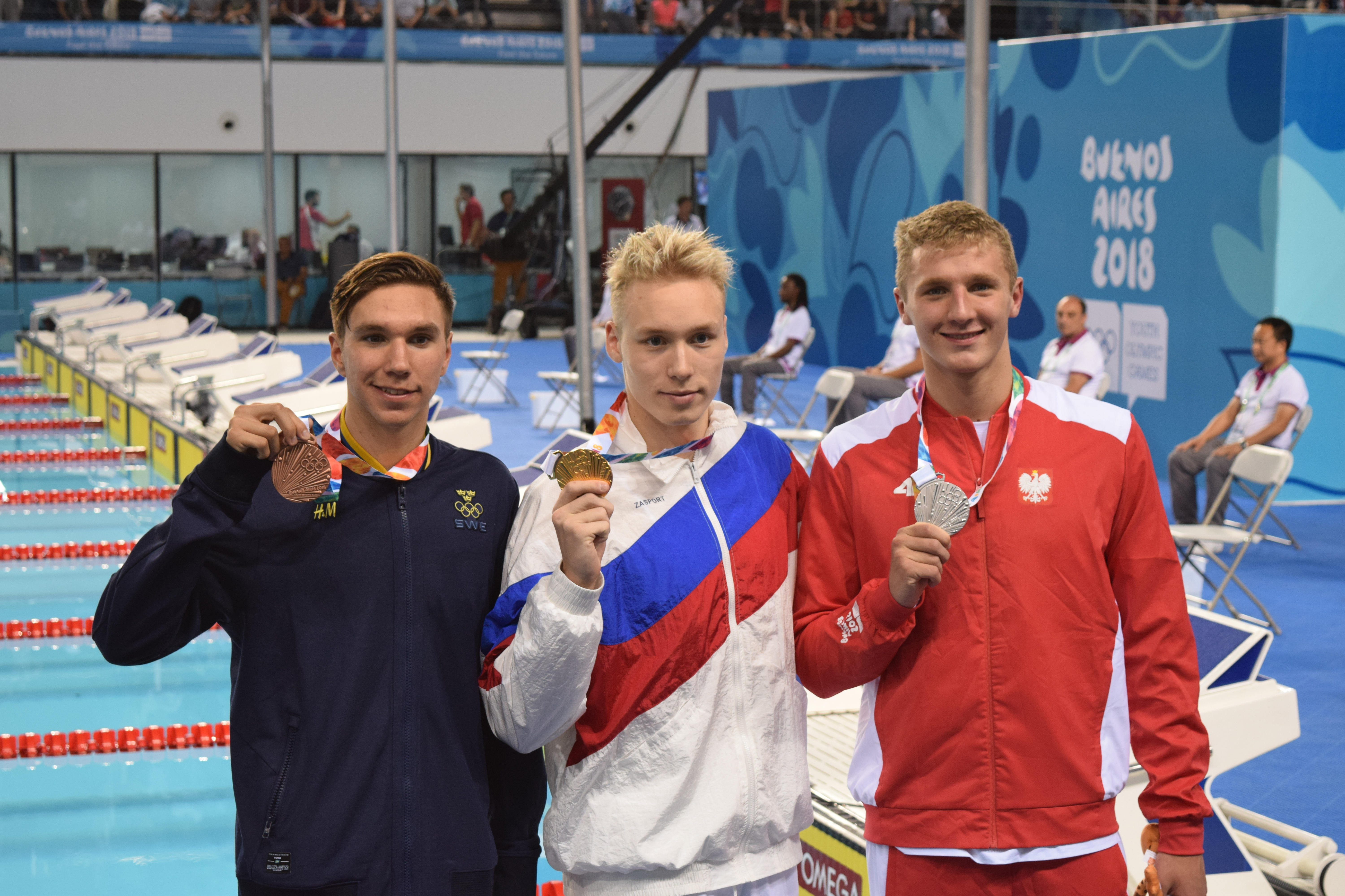 Finales de natación , durante los Juegos Olímpicos de la Juventud 2018 en Buenos Aires. Tarde del 10 de octubre. Andrei MINAKOV, Jakub KRASKA y Robin HANSON.